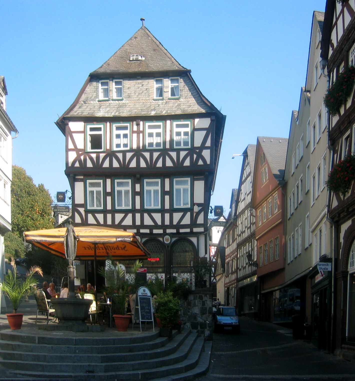 Wetzlar, Germany: Altstadt